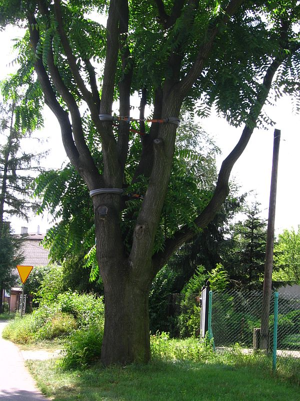 Bożodrzew przy ul. Hallerczyków w Sikorce